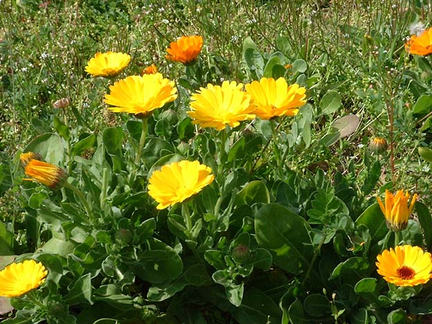 Soucis au printemps Photo Jean Tosti (19/03/04) Reproduction autorisée sous licence GFDL Jean Tosti 19/03/04